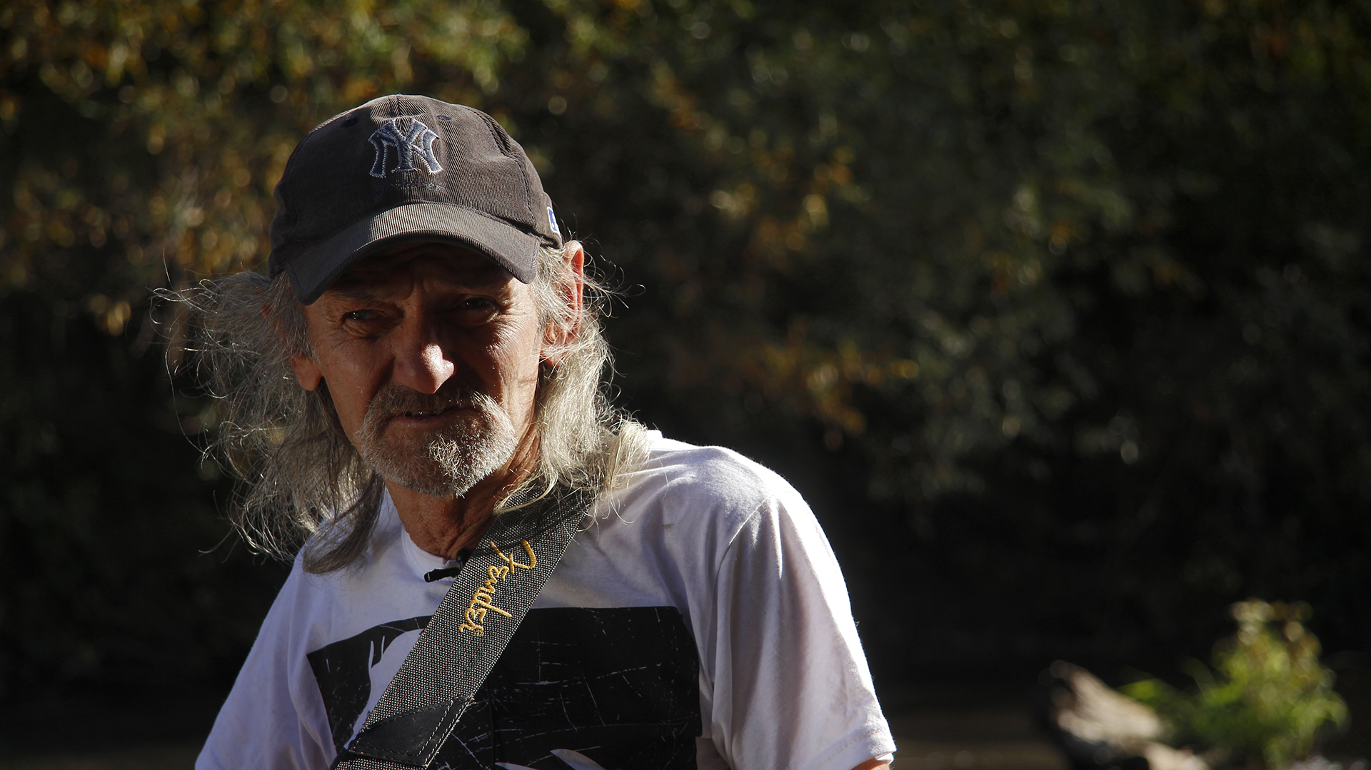 Портрет српског писца, сценаристе и кантаутора Драгана Бабића Драгуце.